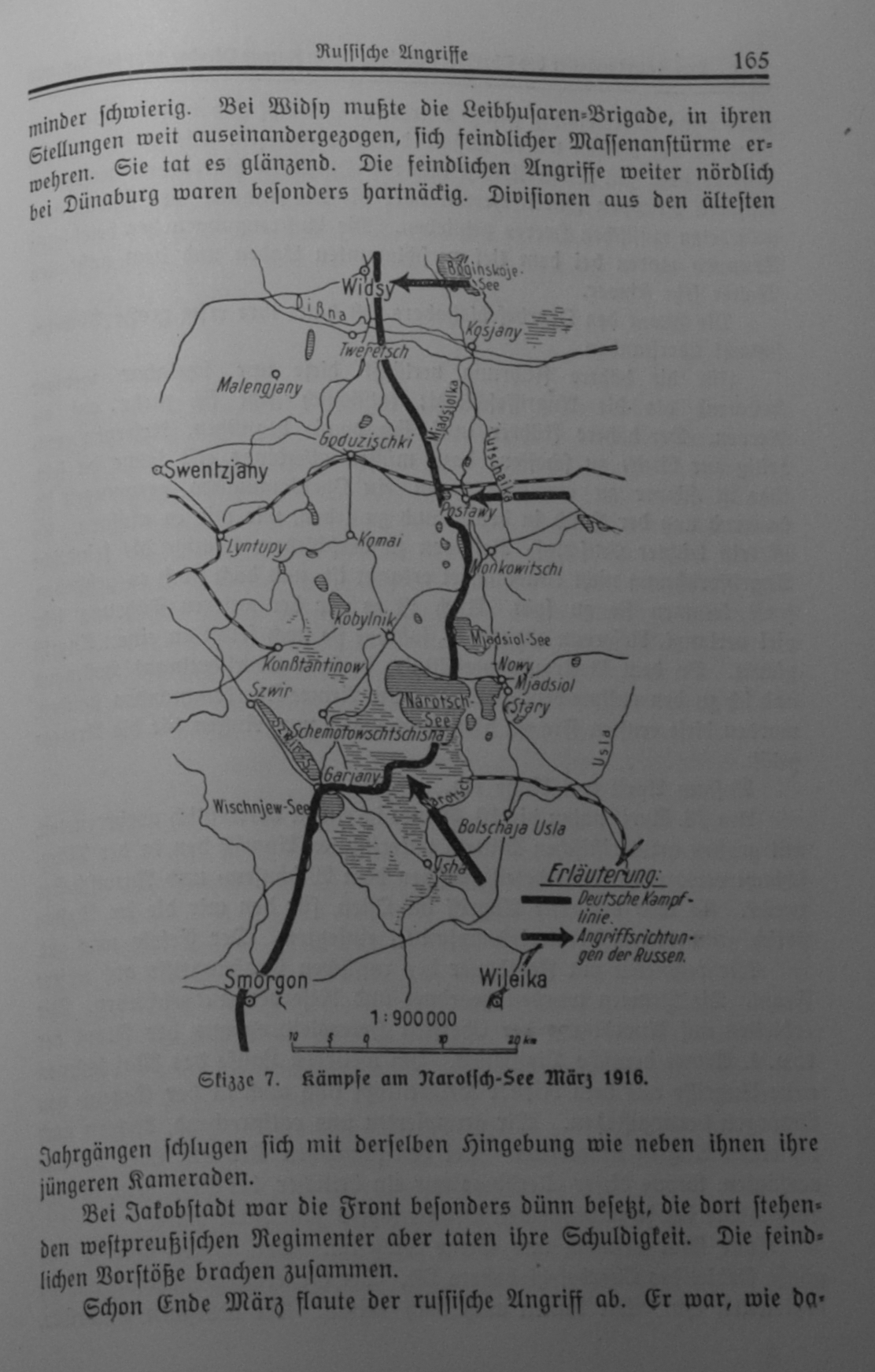 Foto "Meine Kriegserinnerungen" 1914 - 1918